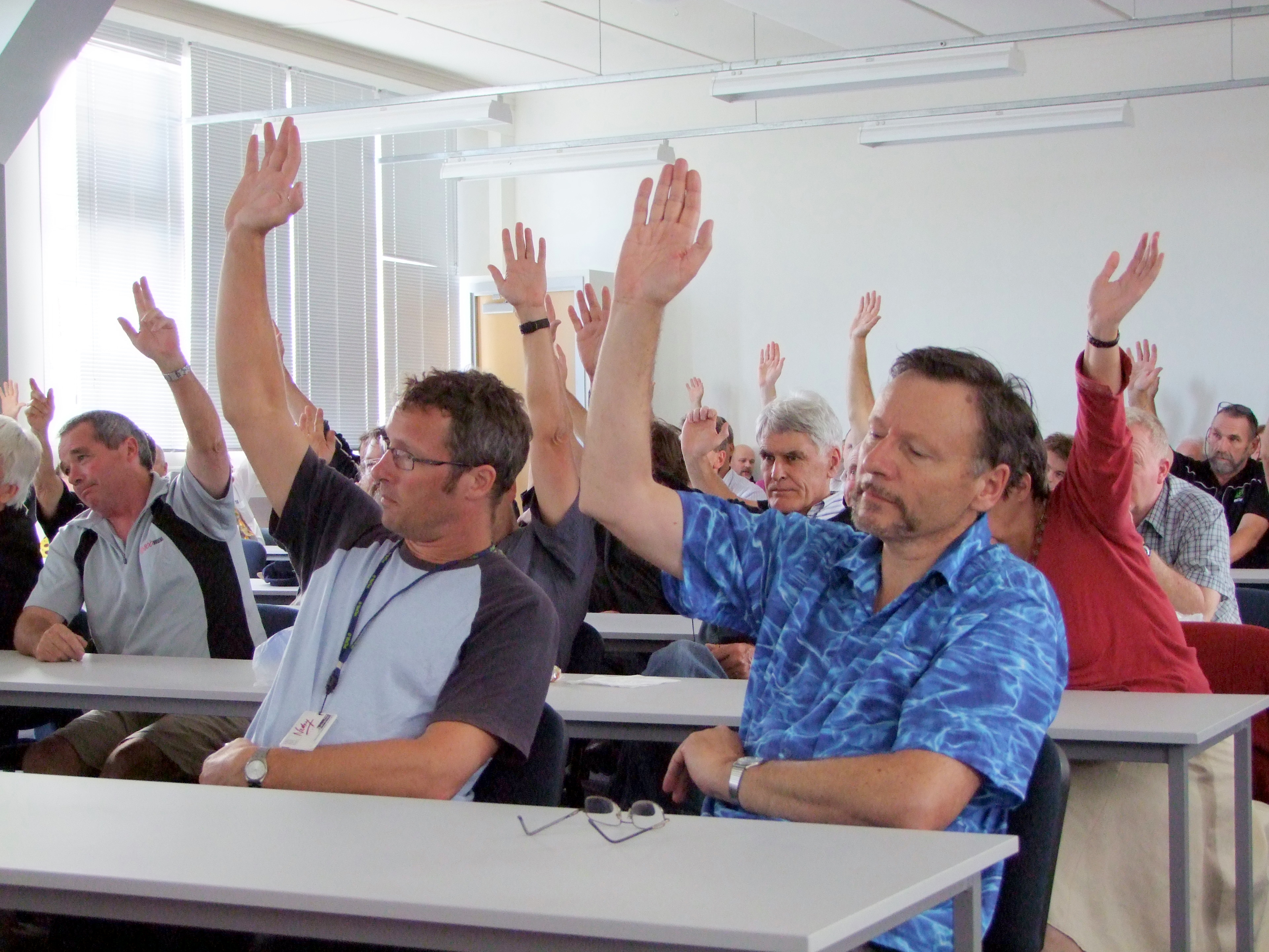 Weltec stopwork meeting, 19 March 2009